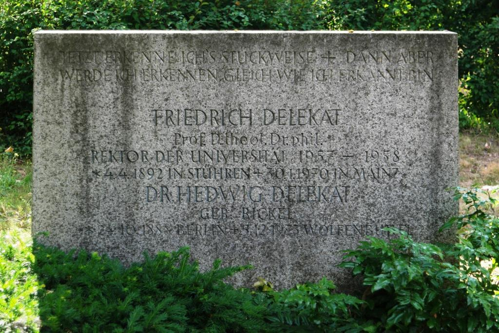 Grab des Theologen Friedrich Delekat, 1892-1970, auf dem Hauptfriedhof Mainz